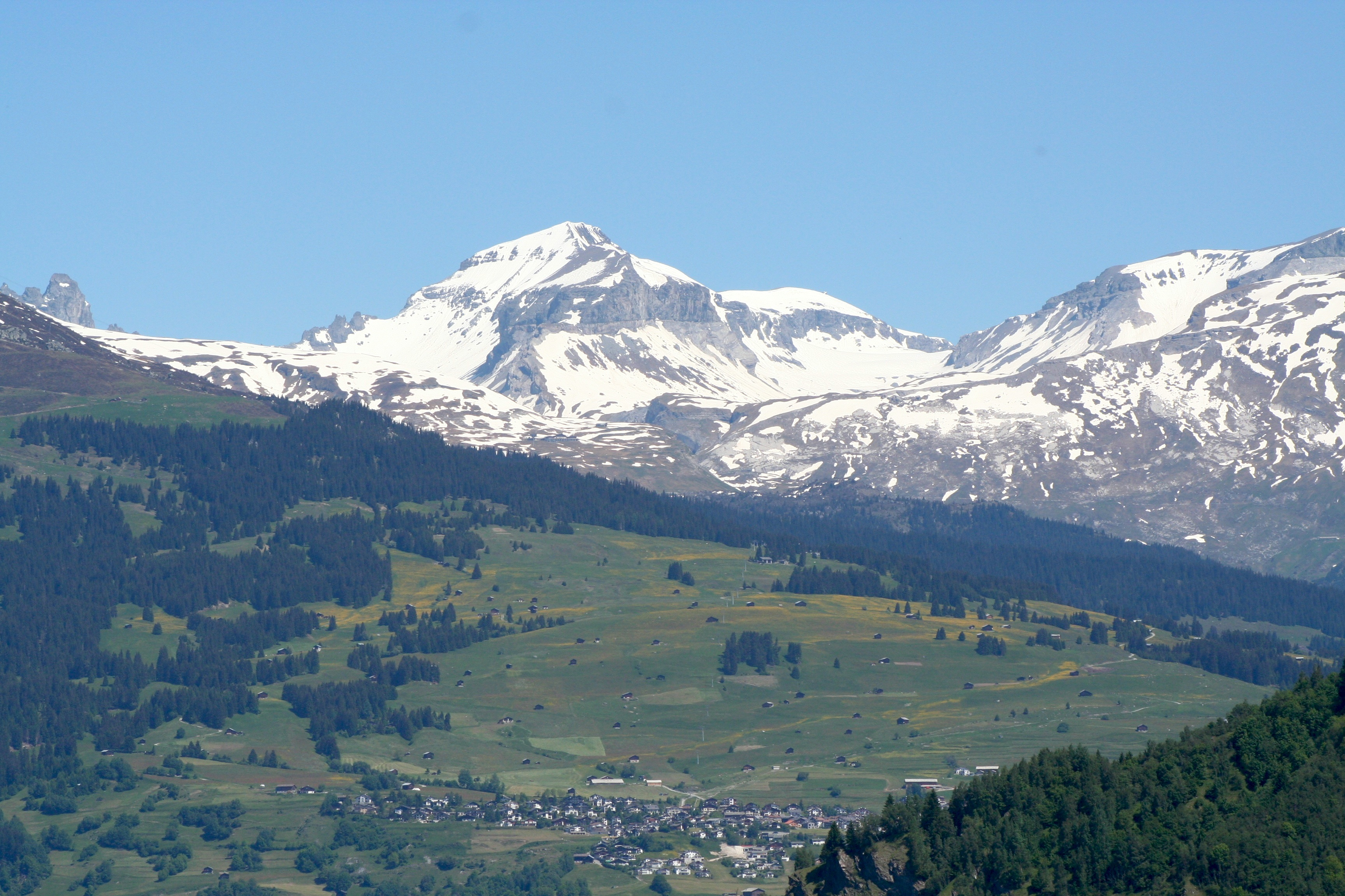 Piz Segnas von Pitasch aus gesehen